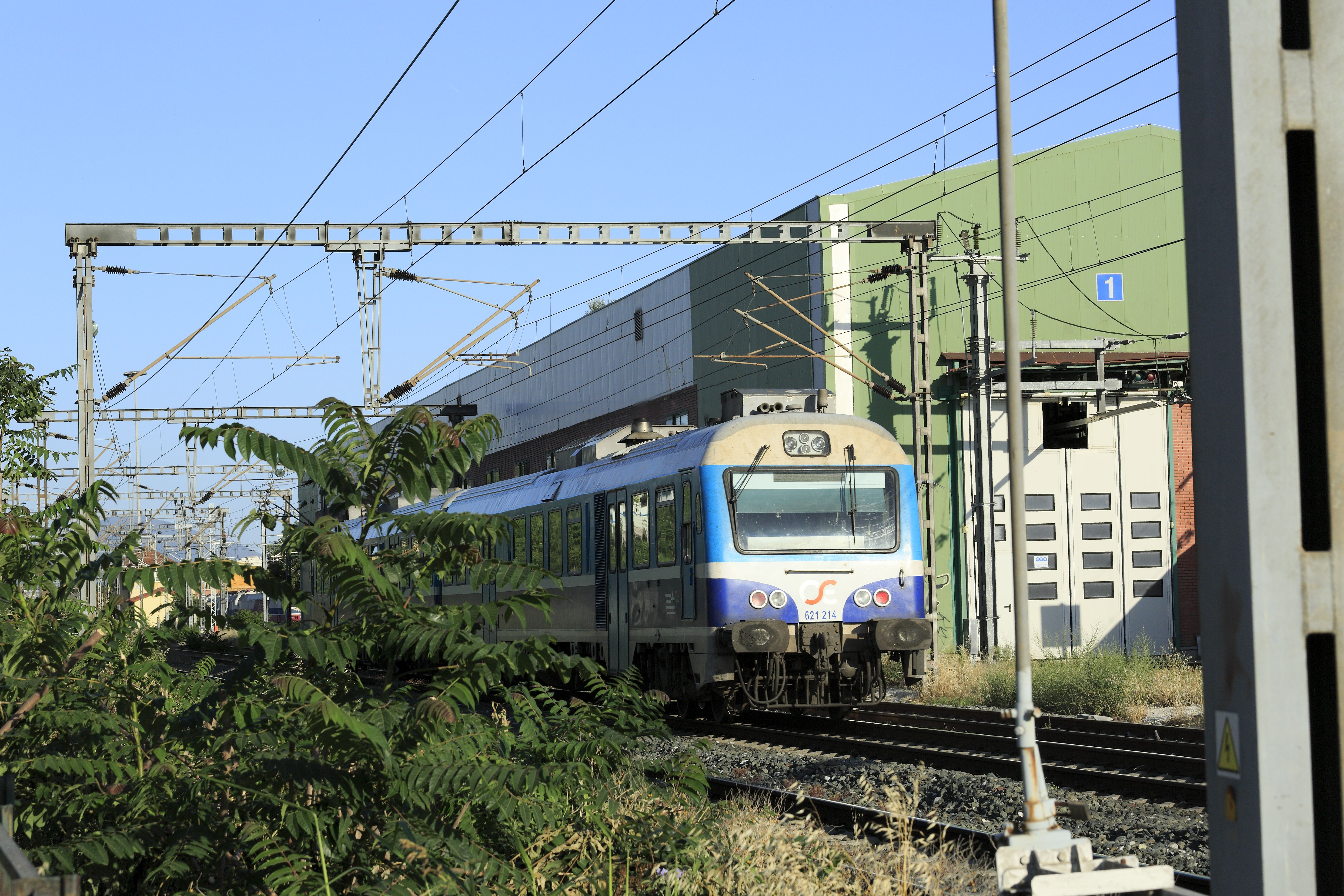 Proastiakós-Zug von Edessa, Nachschuss. Rechts daneben der noch recht neue Ellokschuppen.